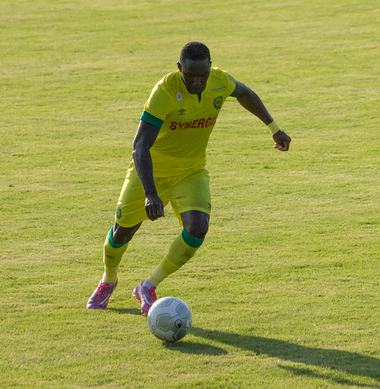 Issa Cissokho, FC Nantes, 2014.